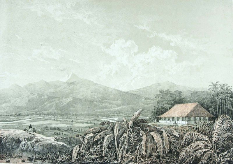 Litho. Litho naar een oorspronkelijk werk van A. Salm. Het afgebeelde landgoed is van ca 1750.. Het landgoed Citrap in Cibinong